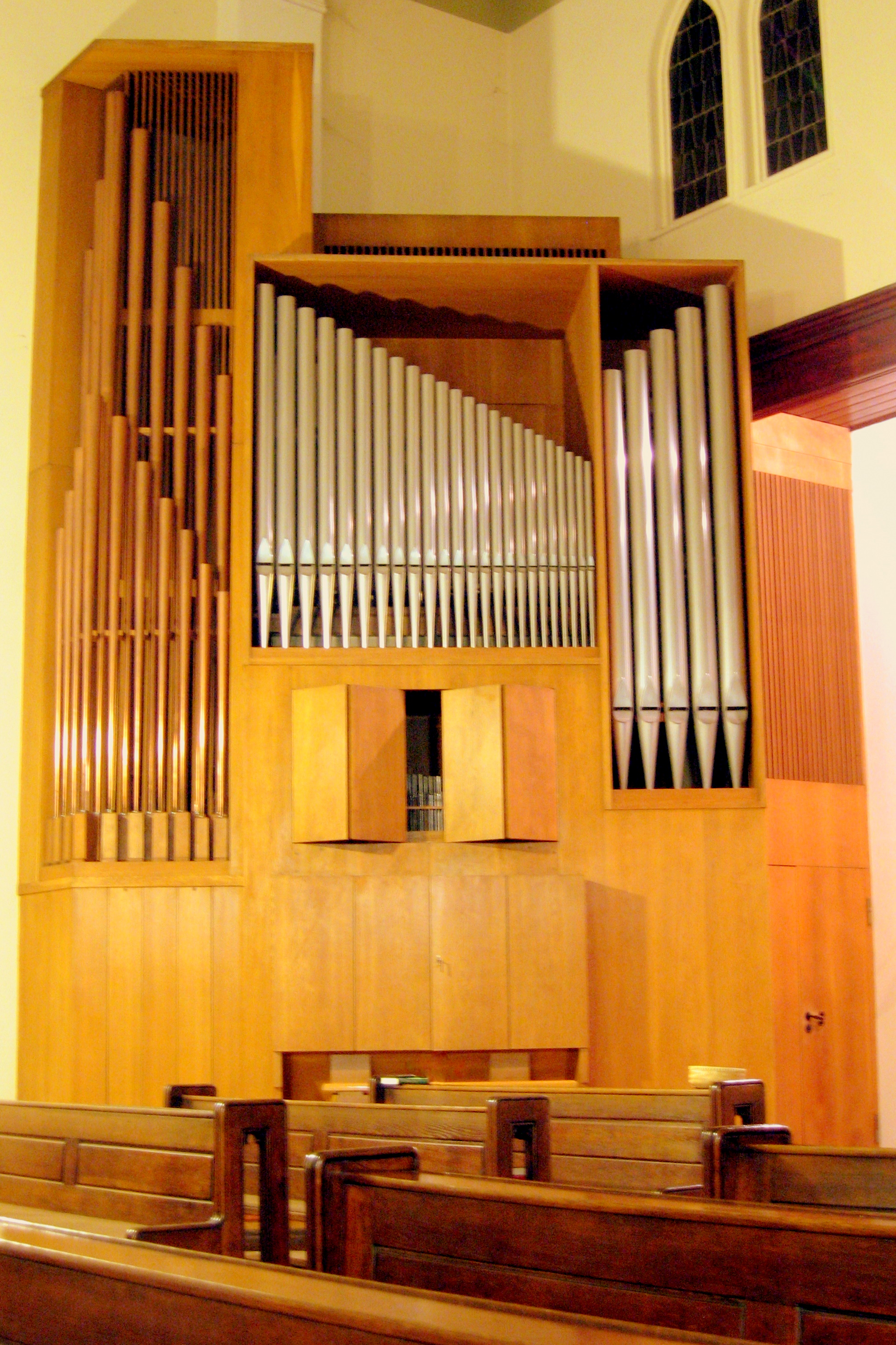 Orgel in der Konventskirche des Sankt-Josefheimes (Berlin) Orgelbau A. Schuster & Sohn, 1968, mechanisch, 21/II, Gestaltung Leweke